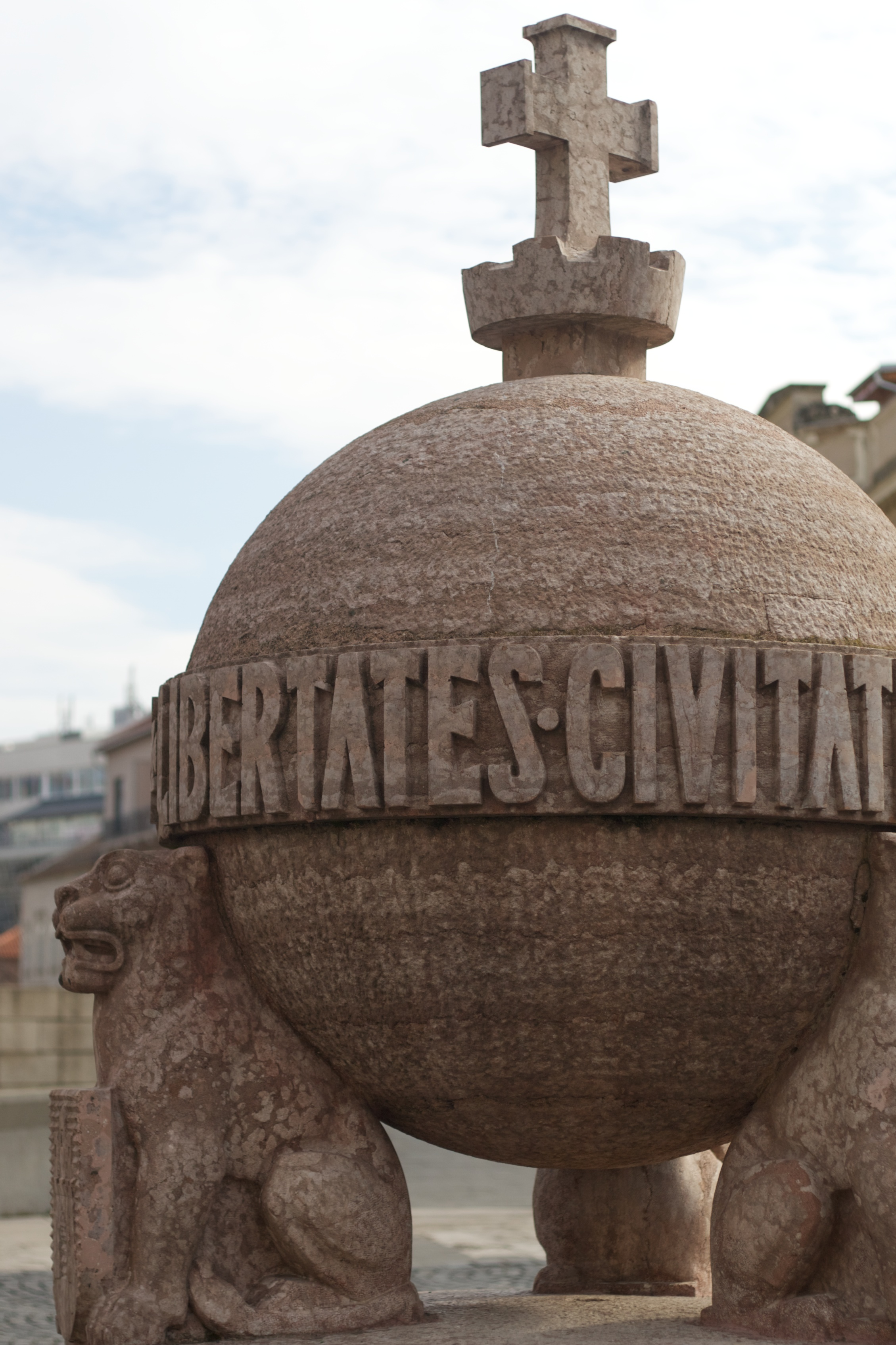 Székesfehérvár